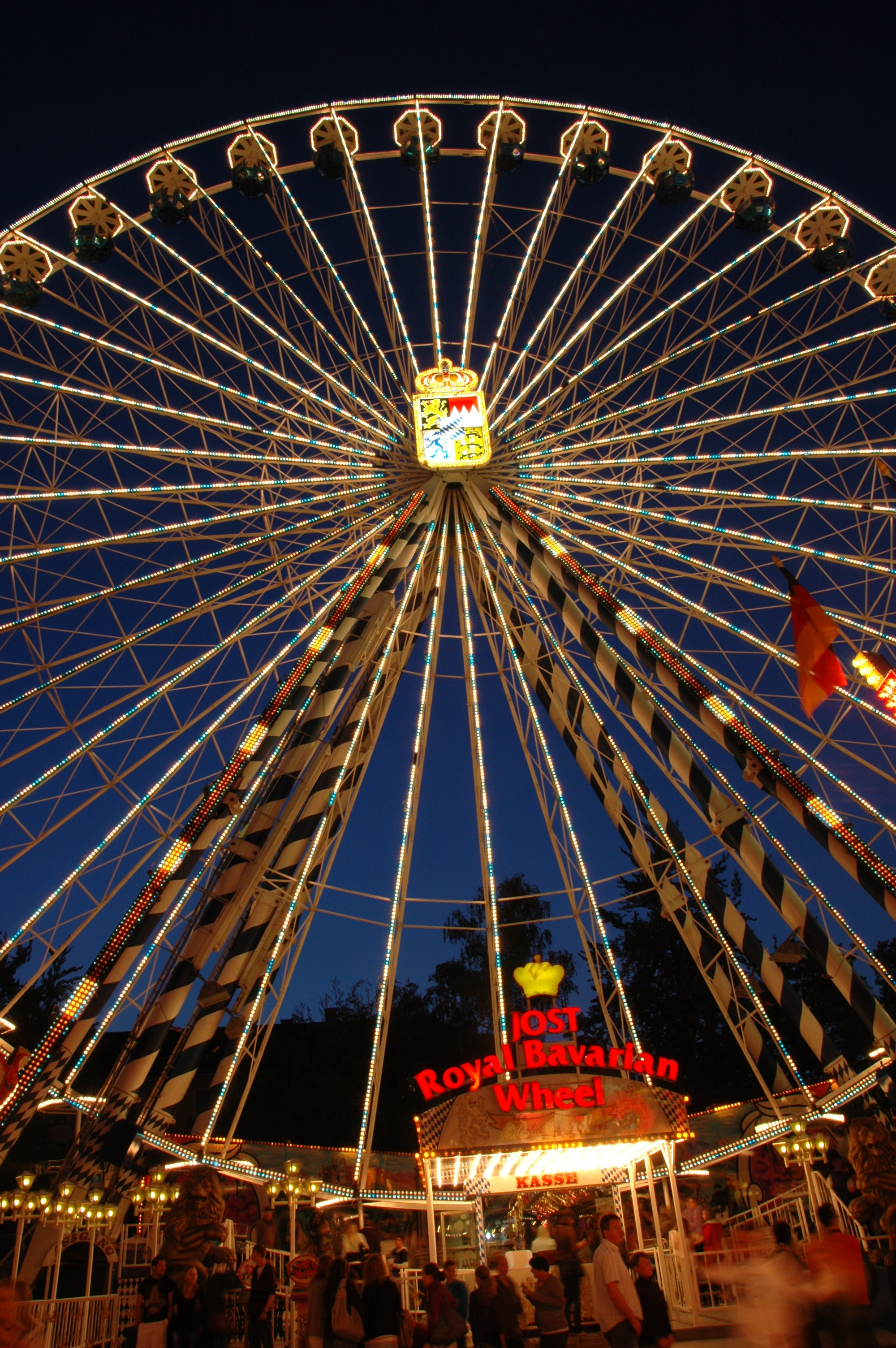 Hofer Volksfest. Findet jährlich für 2 Wochen von Ende Juli bis Anfang August statt.